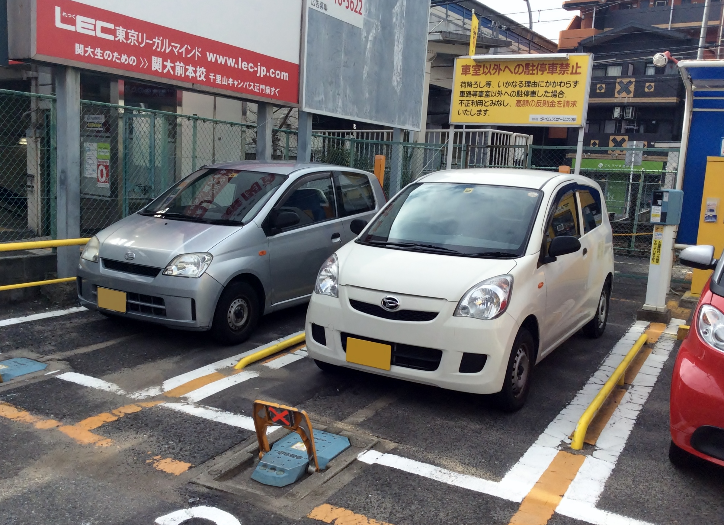 ダイハツ・ミラバンの6代目と7代目をそれぞれフロントから撮影。